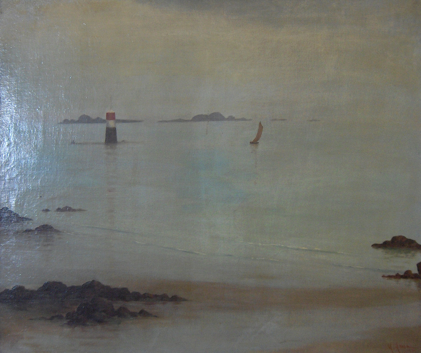 "Marine met vuurtoren", olieverf op doek door Marguerite Arosa (1854-1903); privé collectie